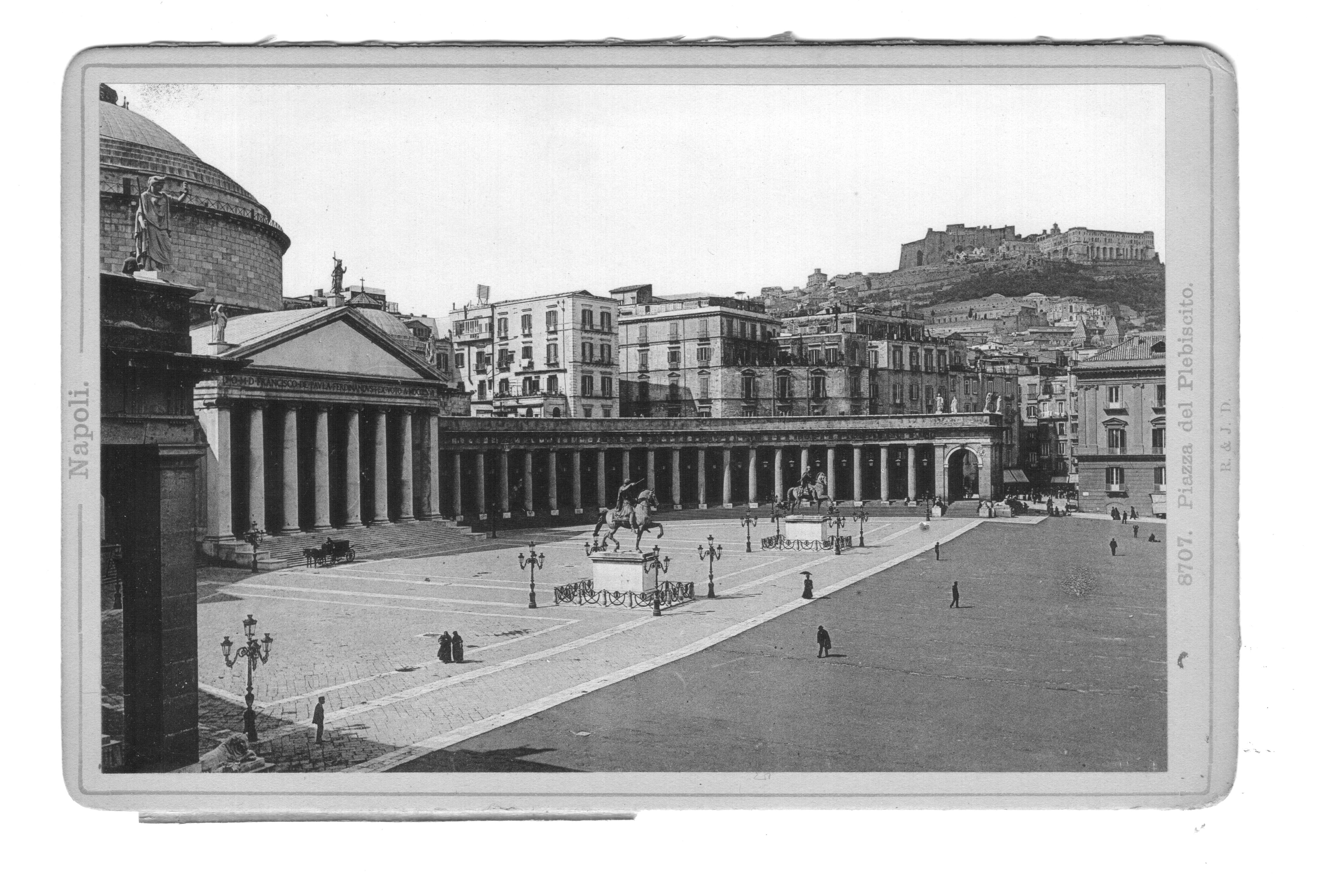 Itália. Nápoly. Römmler & Jonas (Dresden) felvétele. PD-old. A Nápoly című fényképalbum 20, fehér kartonsorozatra ragasztott, fehér vászonnal összefűzött fényképéből. ©© Megjelent Creative Commons alatt a Metapolisz sorozatban. A Metapolisz sorozat valamennyi képe és filmje Creative Commons alatti valamint kereskedelmi - for profit - célra is felhasználható. Ajánlott hivatkozás: Derzsi Elekes Andor: Metapolisz DVD line ©© Published under Creative Commons in the Metapolisz DVD line. All of the photos and vids in the Metapolisz DVD line are under Creative Commons and can be used even for commercial – for profit – purposes. Recommended Citation Derzsi Elekes Andor: Metapolisz DVD line